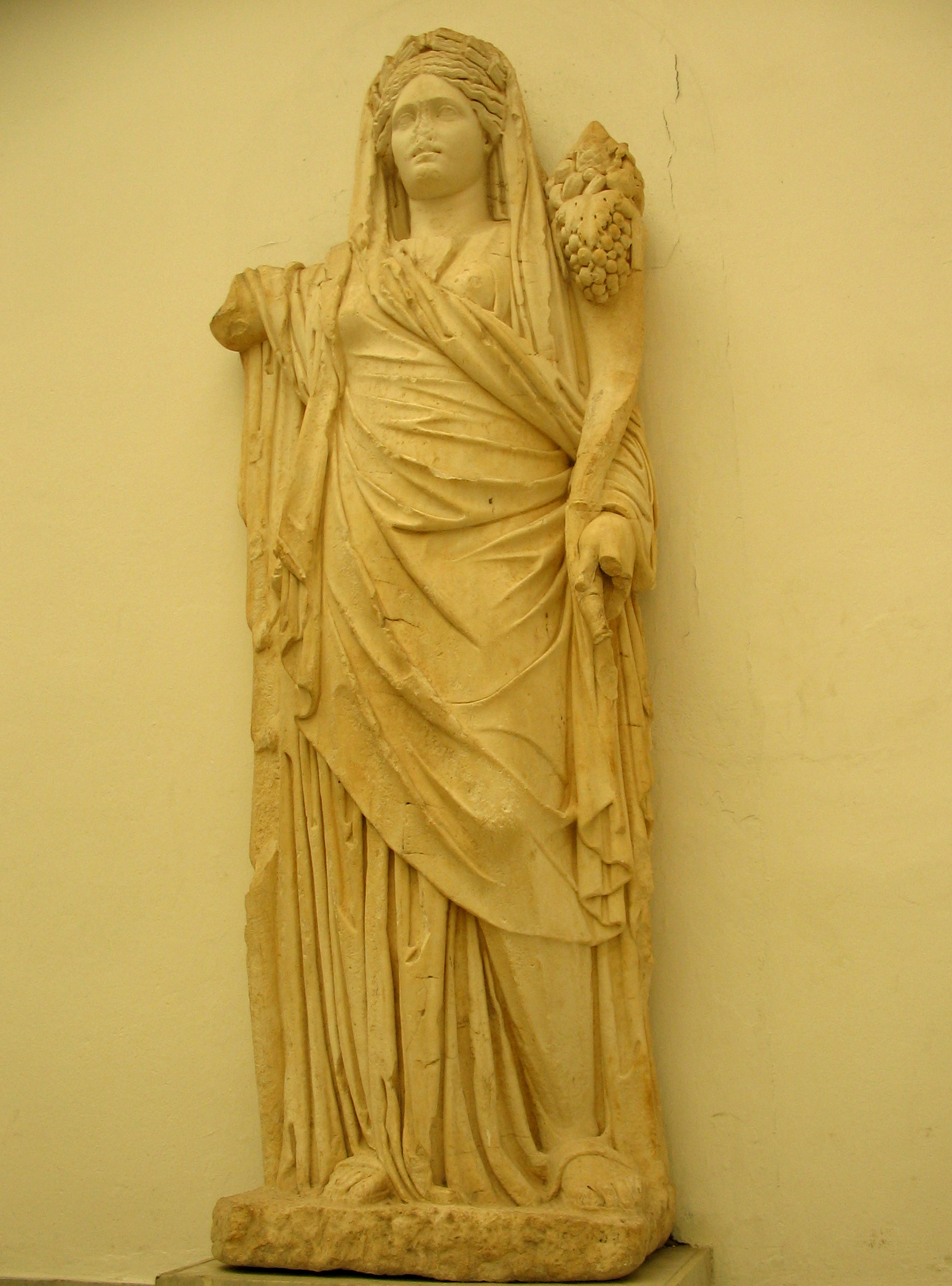 Concordia Pantea, scultura romana II sec., ex Museo nazionale del Bardo,Tunisi.